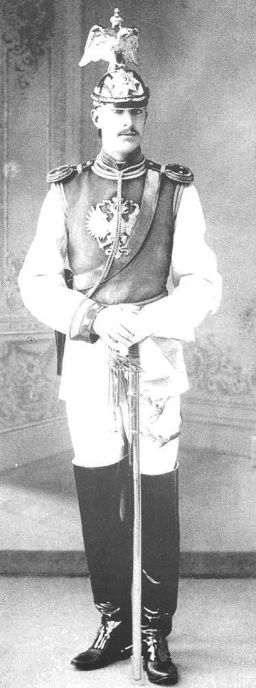 Лейхтенбергский, Георгий Николаевич